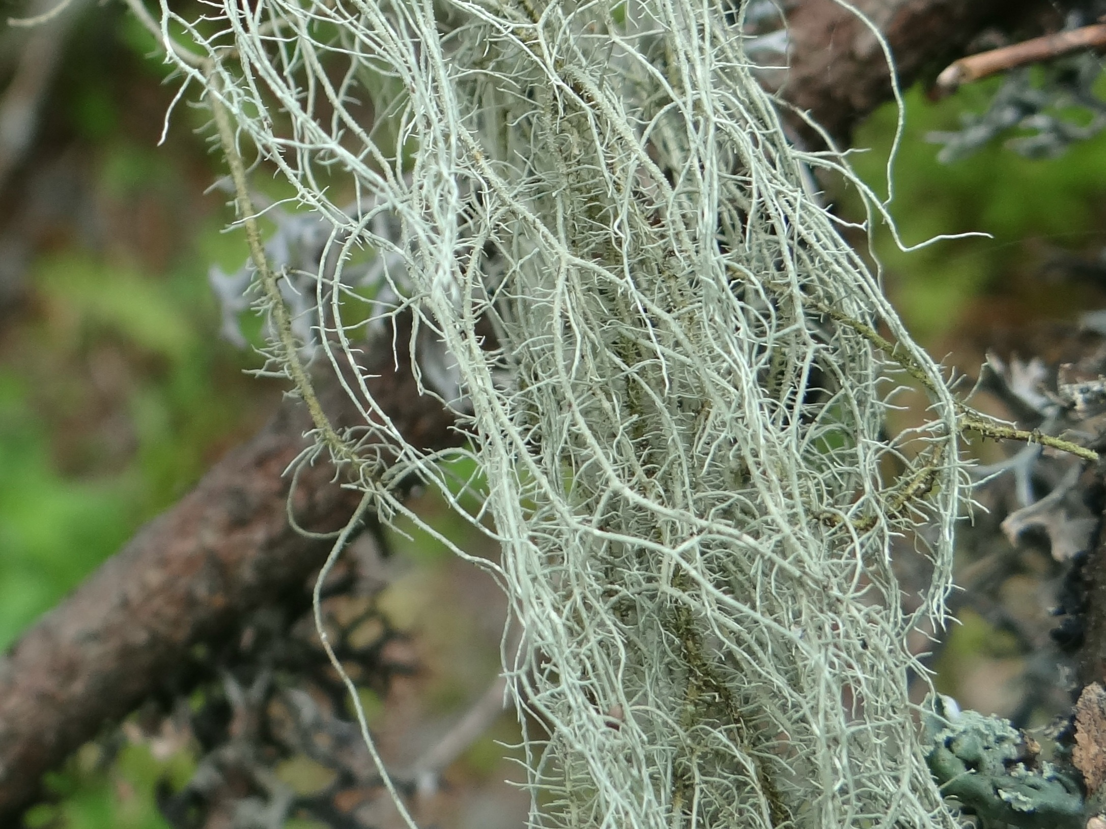 Usnea filipendula (habitat:Tatra Mountains, Dolina Tomanowa